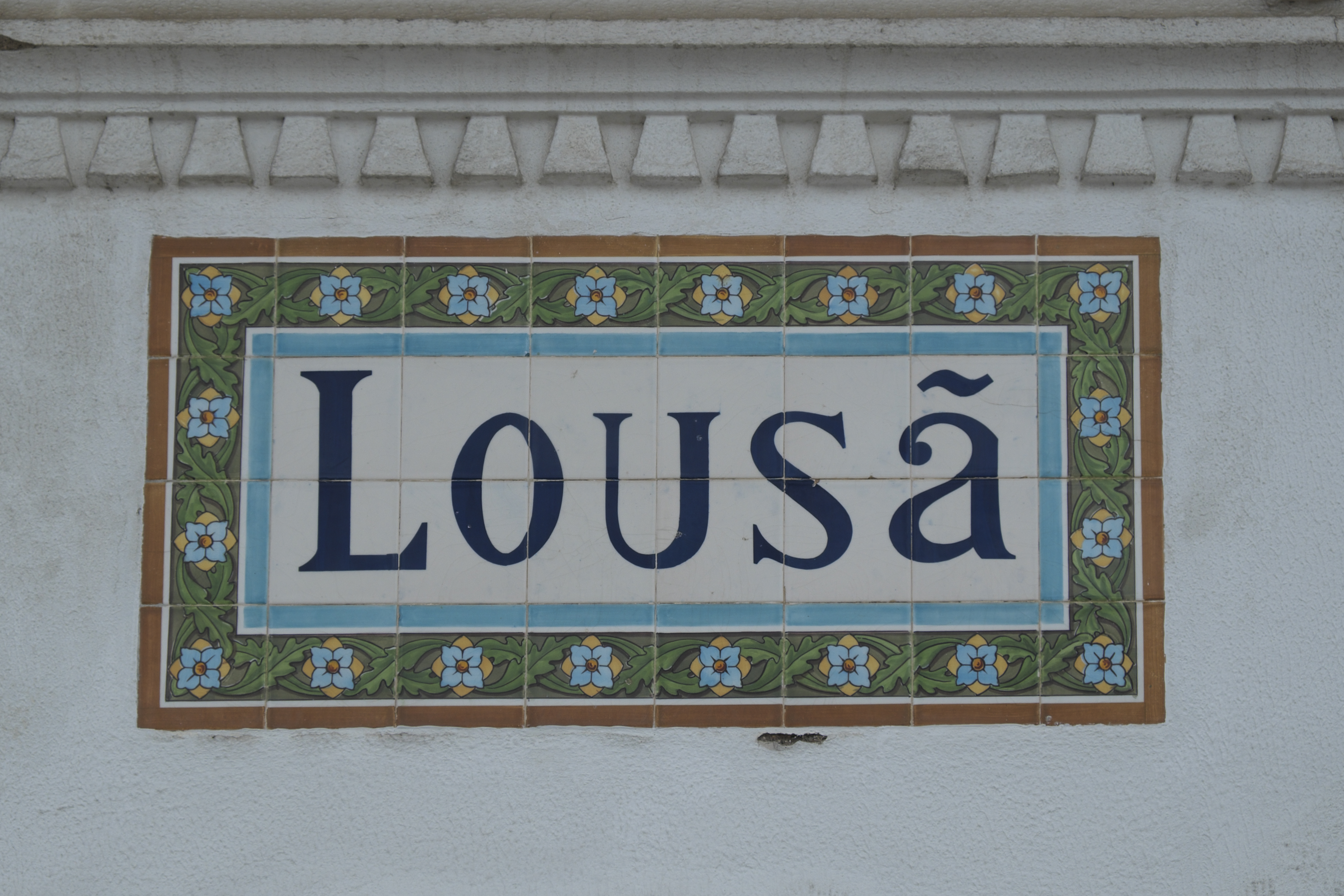 Keramikschild am Bahnhof von Lousã im Distrikt Coimbra (Portugal)